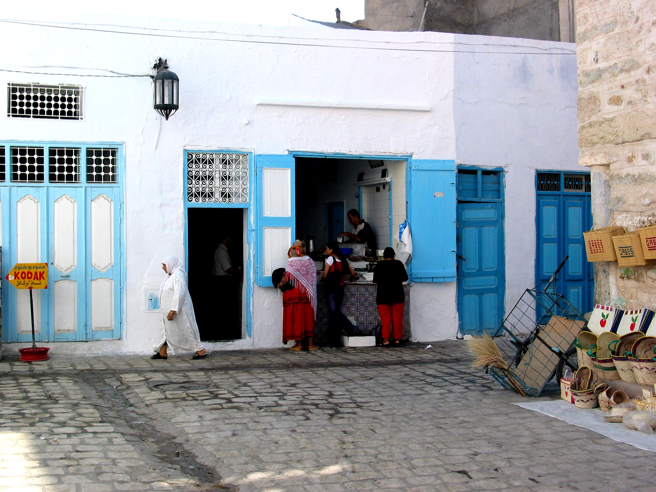 Kairouan